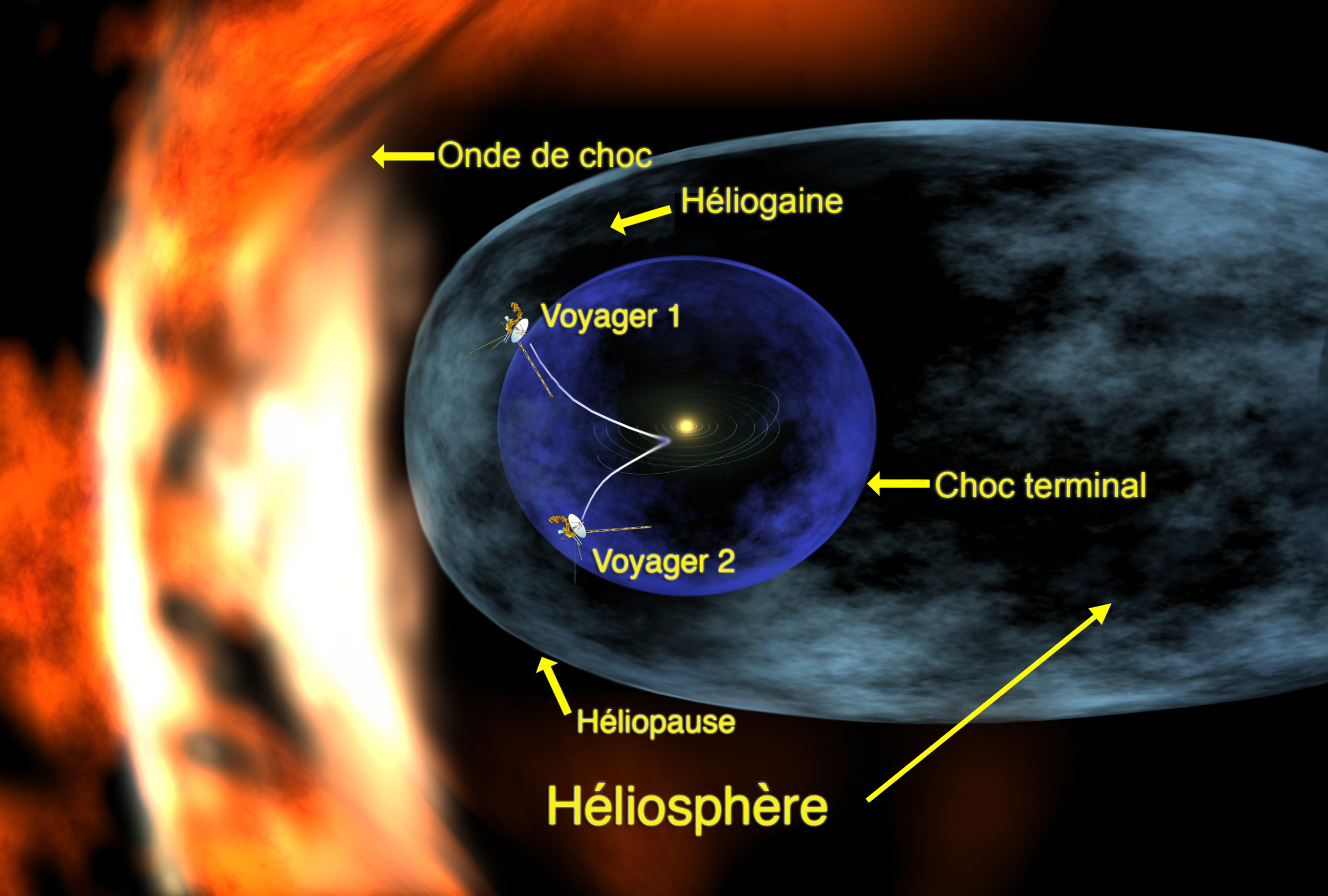 Traduction française de l'image Voyager_1_entering_heliosheath_region.jpg sur commons